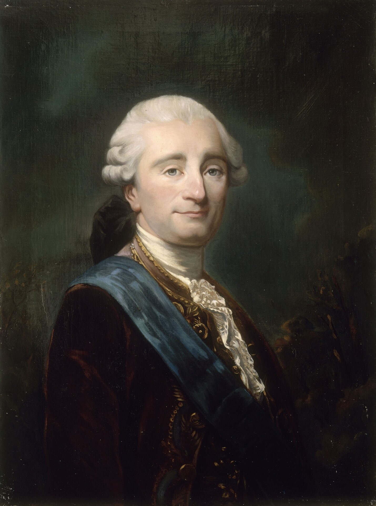 François-Emmanuel Guignard, comte de Saint-Priest (1735-1821), at one time Minister for the Maison du Roi.